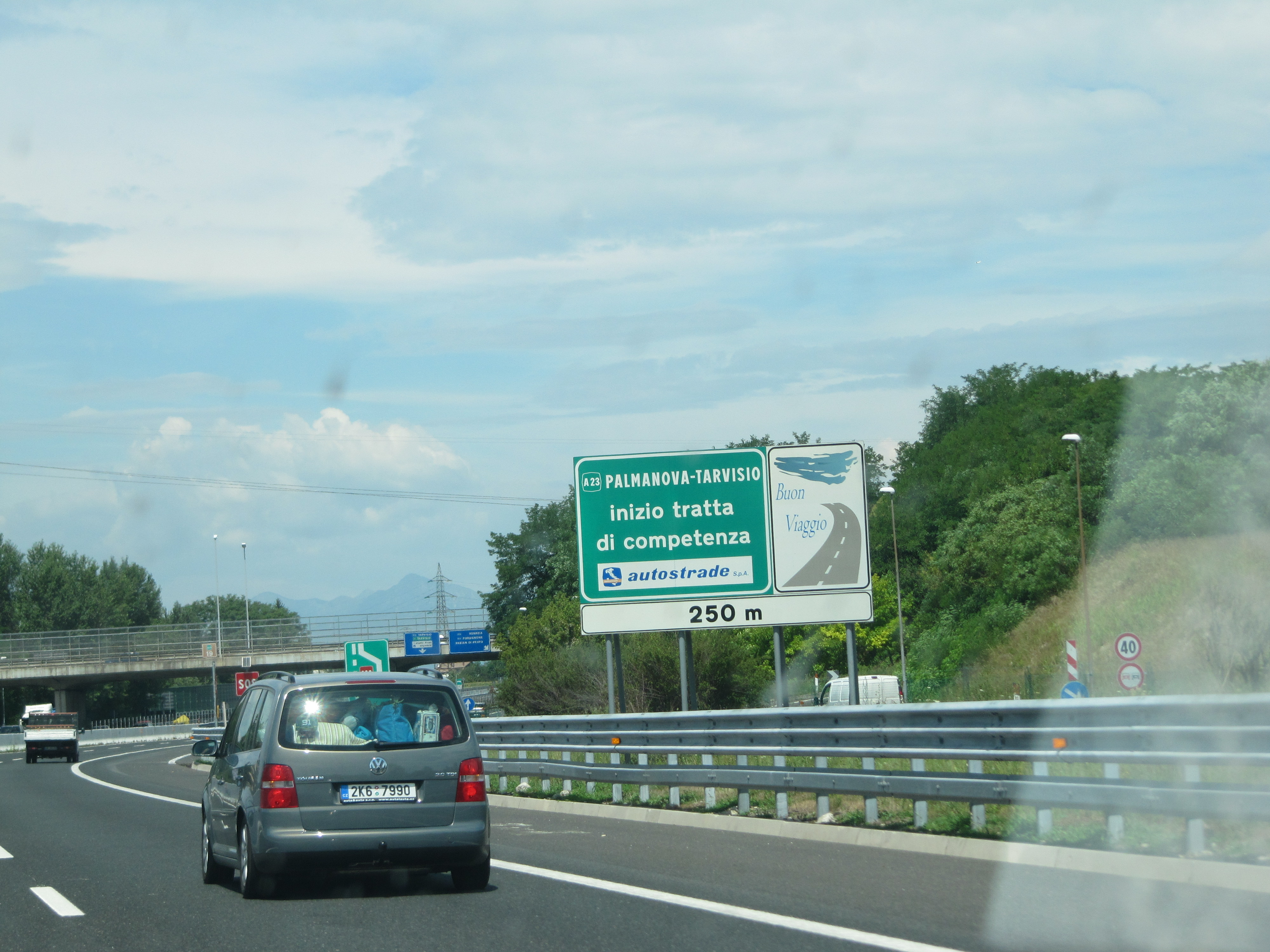 Cambia Competenza tra Autovie Venete e Autostrade per l'Italia